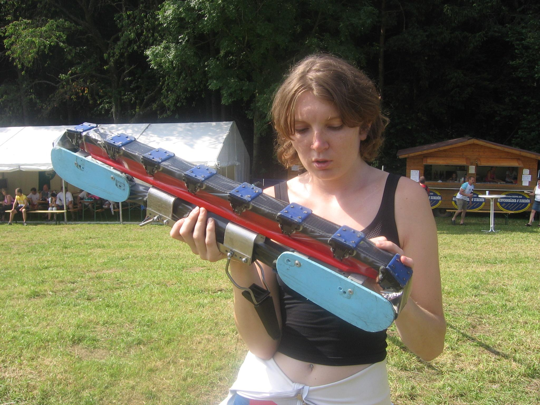 Zuzana Gardavská, mistryně světa v travním lyžování